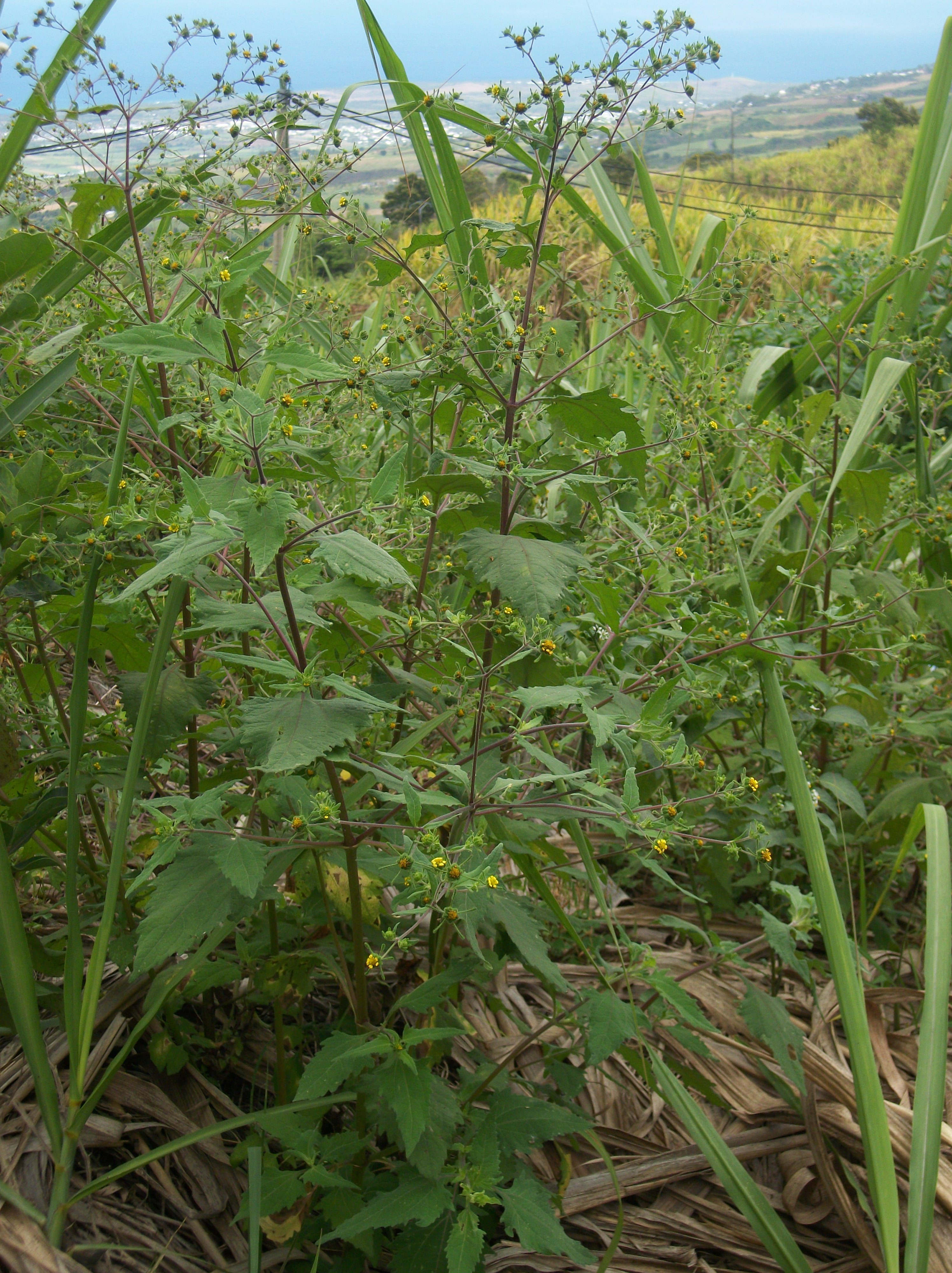 Il s'agit de montrer ici, les différentes hauteur que peuvent atteindre cette plante.